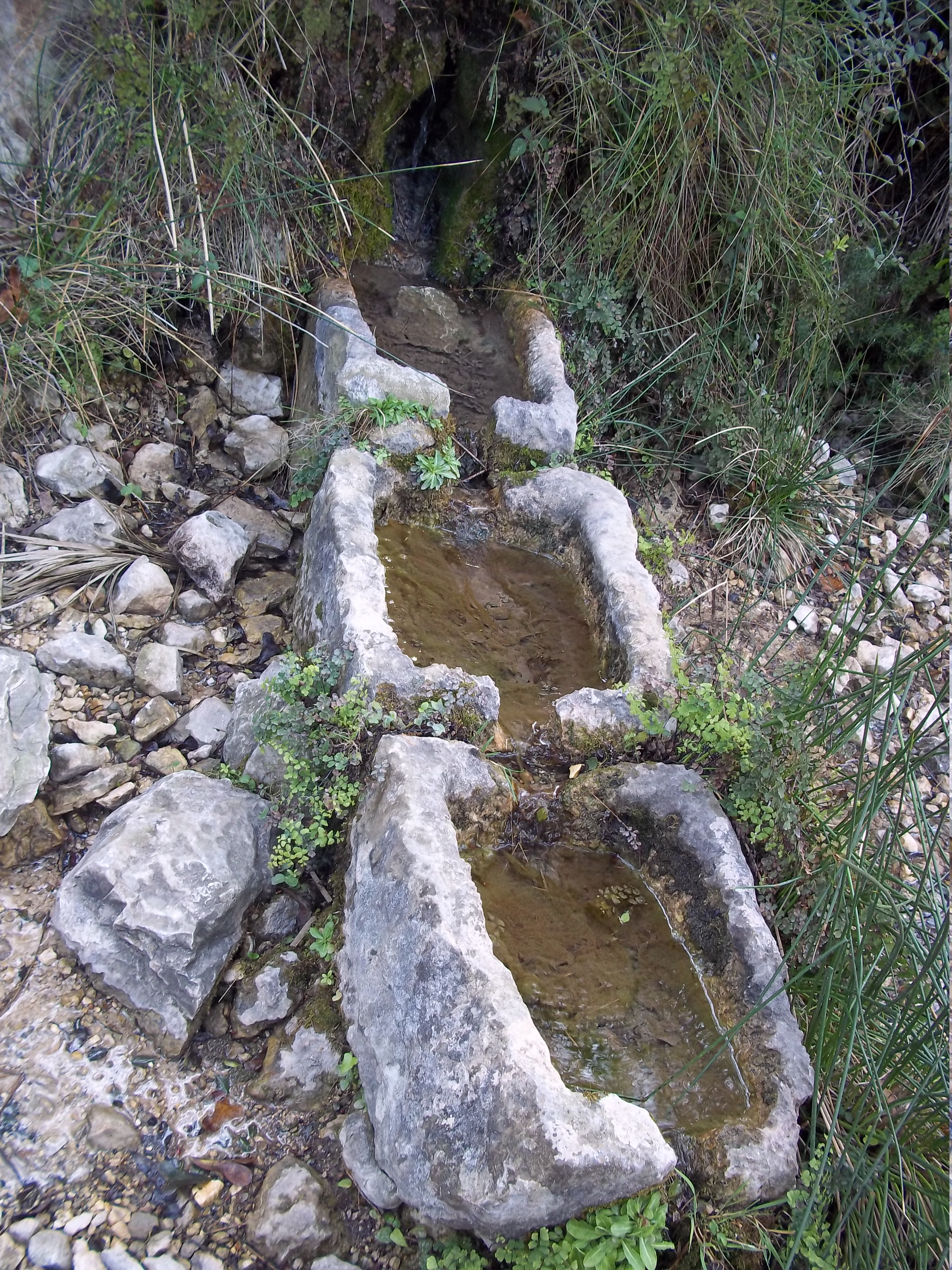 Diversos detalls del Barranc de l'Infern a la Vall de Laguar. Font de Reinós